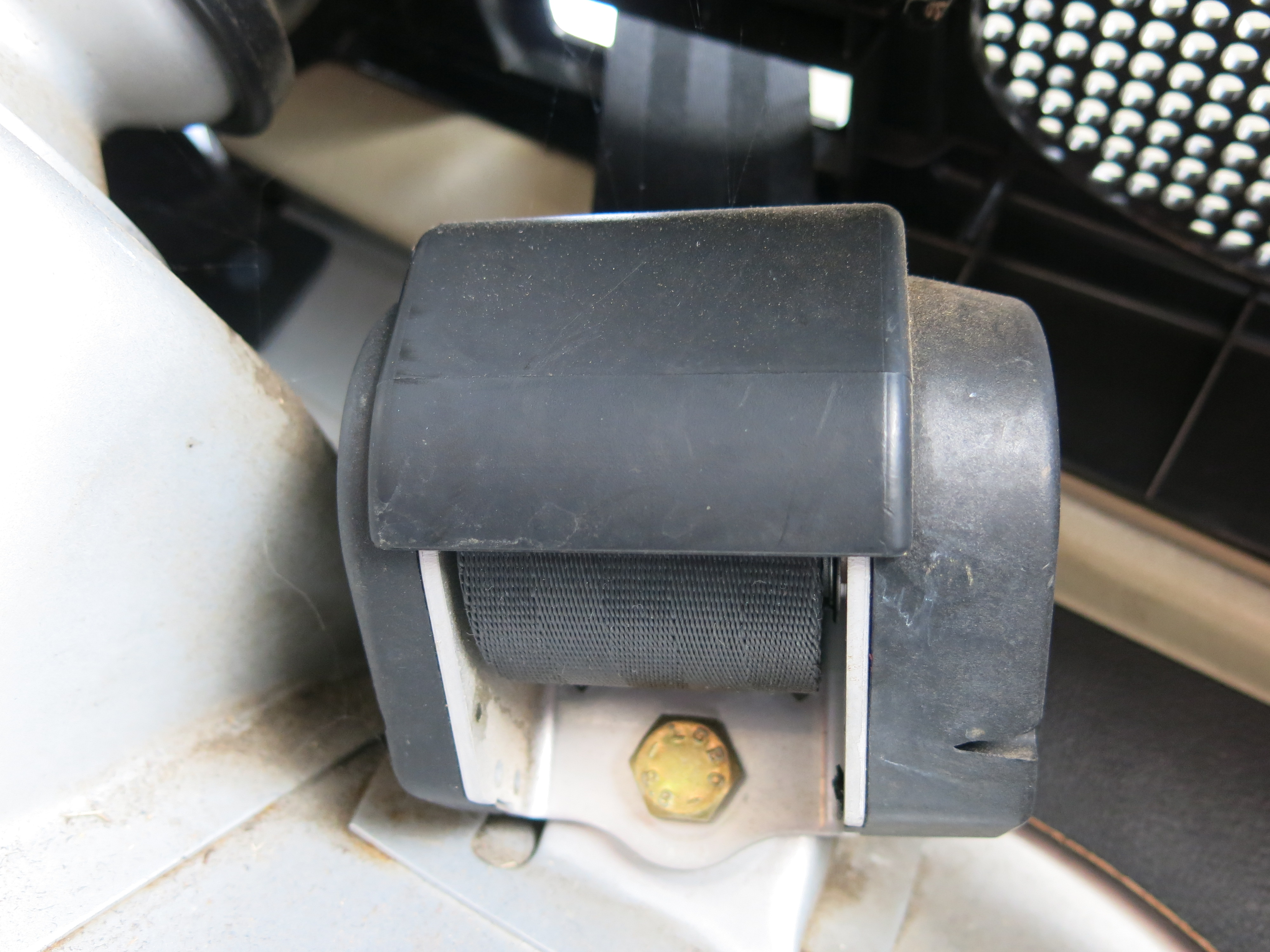 Dreipunktsicherheitsgurt, Aufrollmechanismus